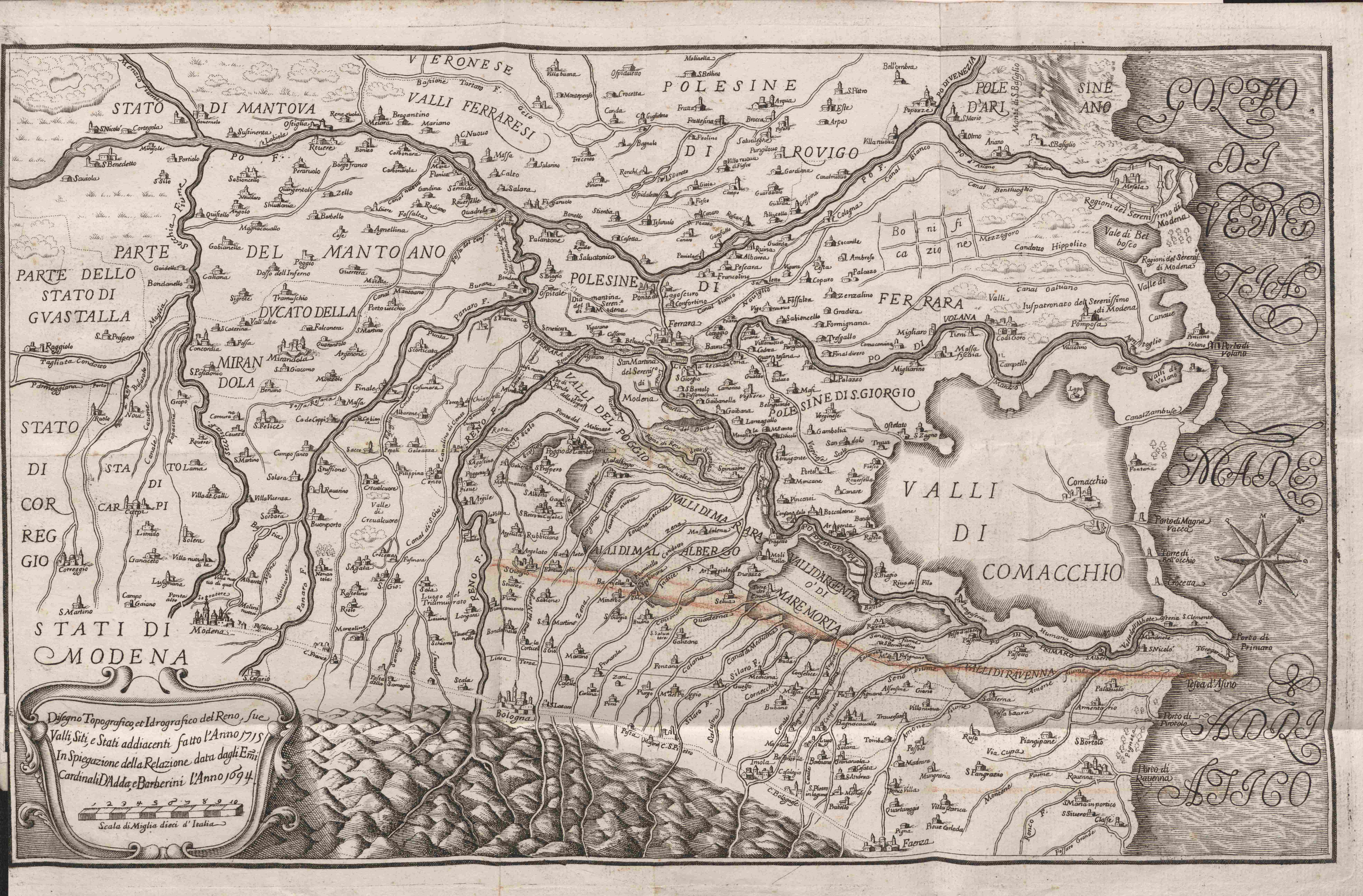 Topografia e idrografia del Reno tratto da Progetto col quale s’espone alla sacra Congregazione dell’acque il modo di condurre il Reno unito agli altri torrenti al mare.